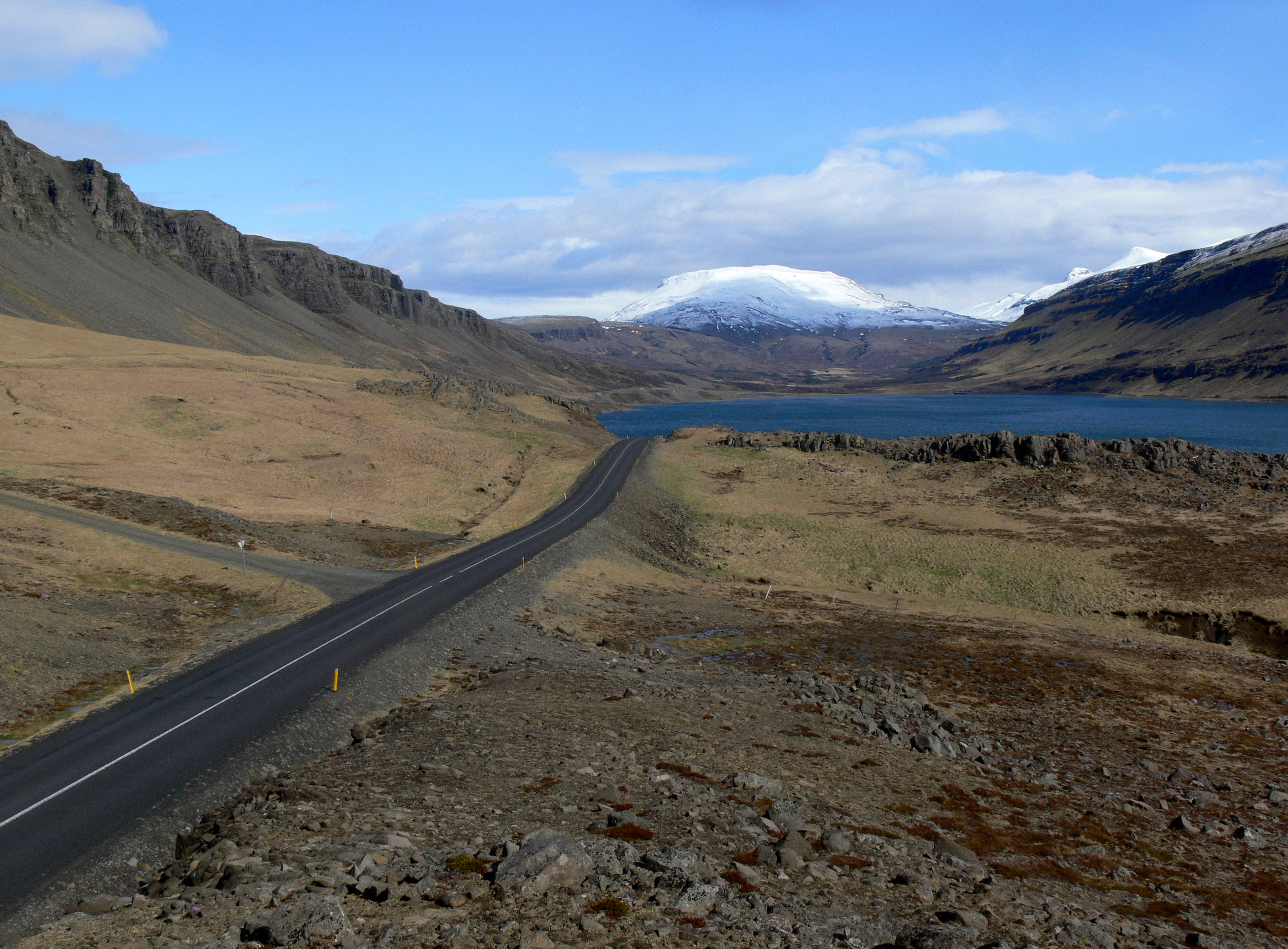 Hvalfjörður mit Botnssúlur im Hintergrund.